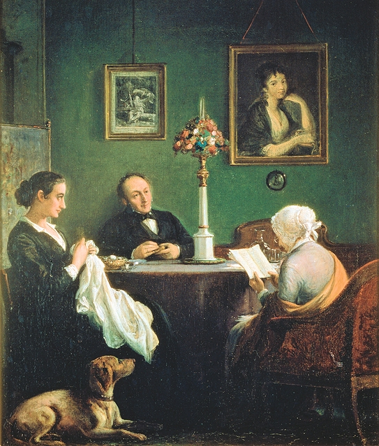 Fru Gyllembourg læser op af sine Hverdags-Historier for J.L. Heiberg og frue 1870